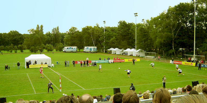 Faustballspiel Deutschland-Schweiz, World Games 2005 Duisburg, Vorrunde